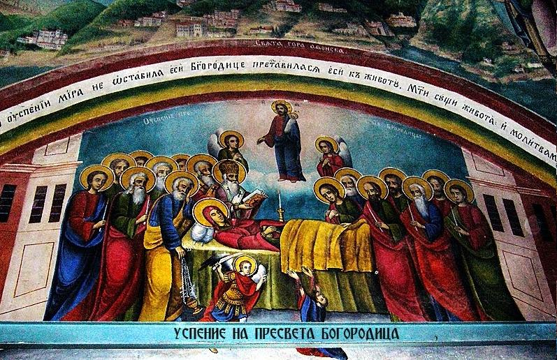 Фреска со приказ на упокојувањето на Пресвета Богородица во црквата во манастирот Си Свети во Лешани, Охридско